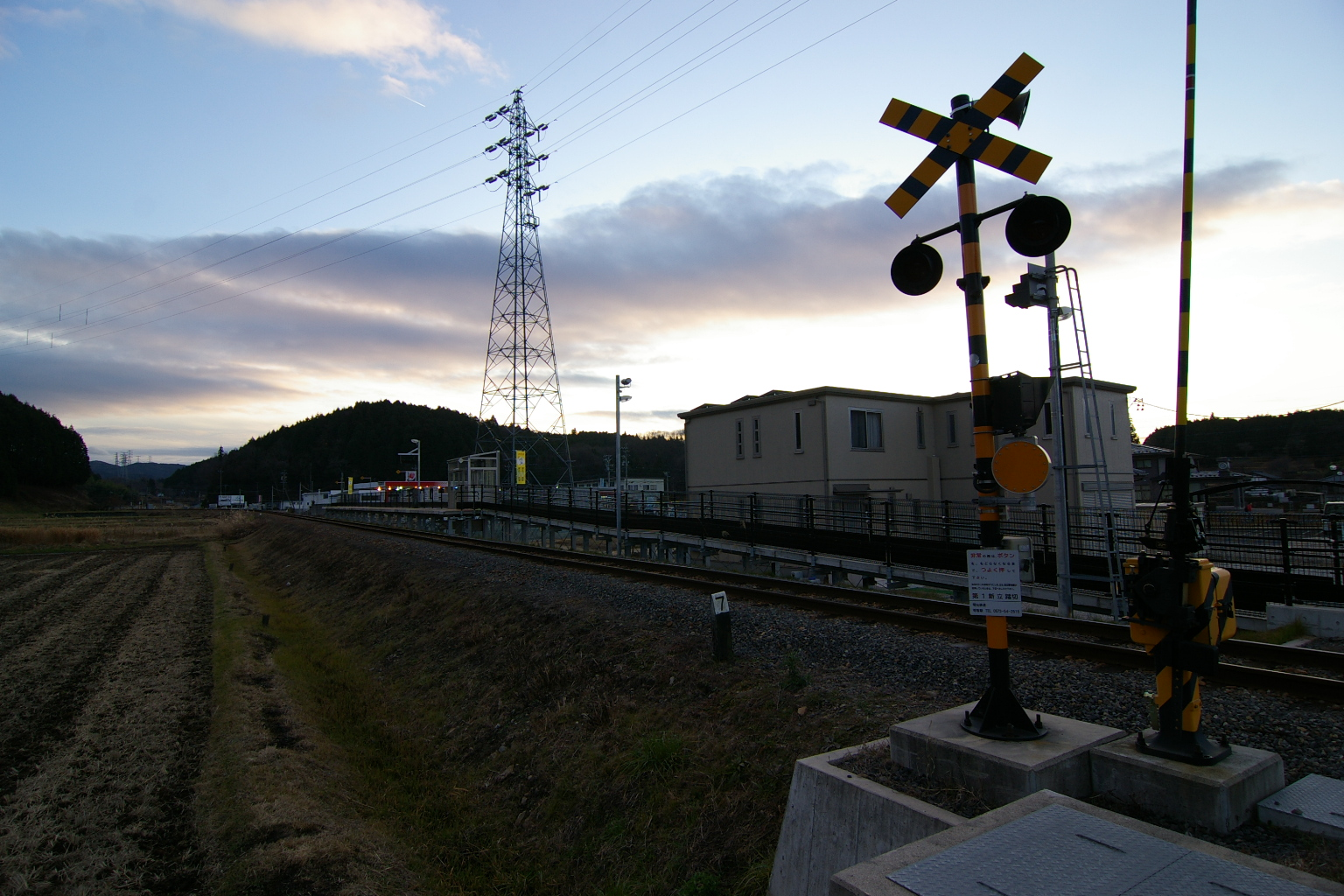 極楽駅